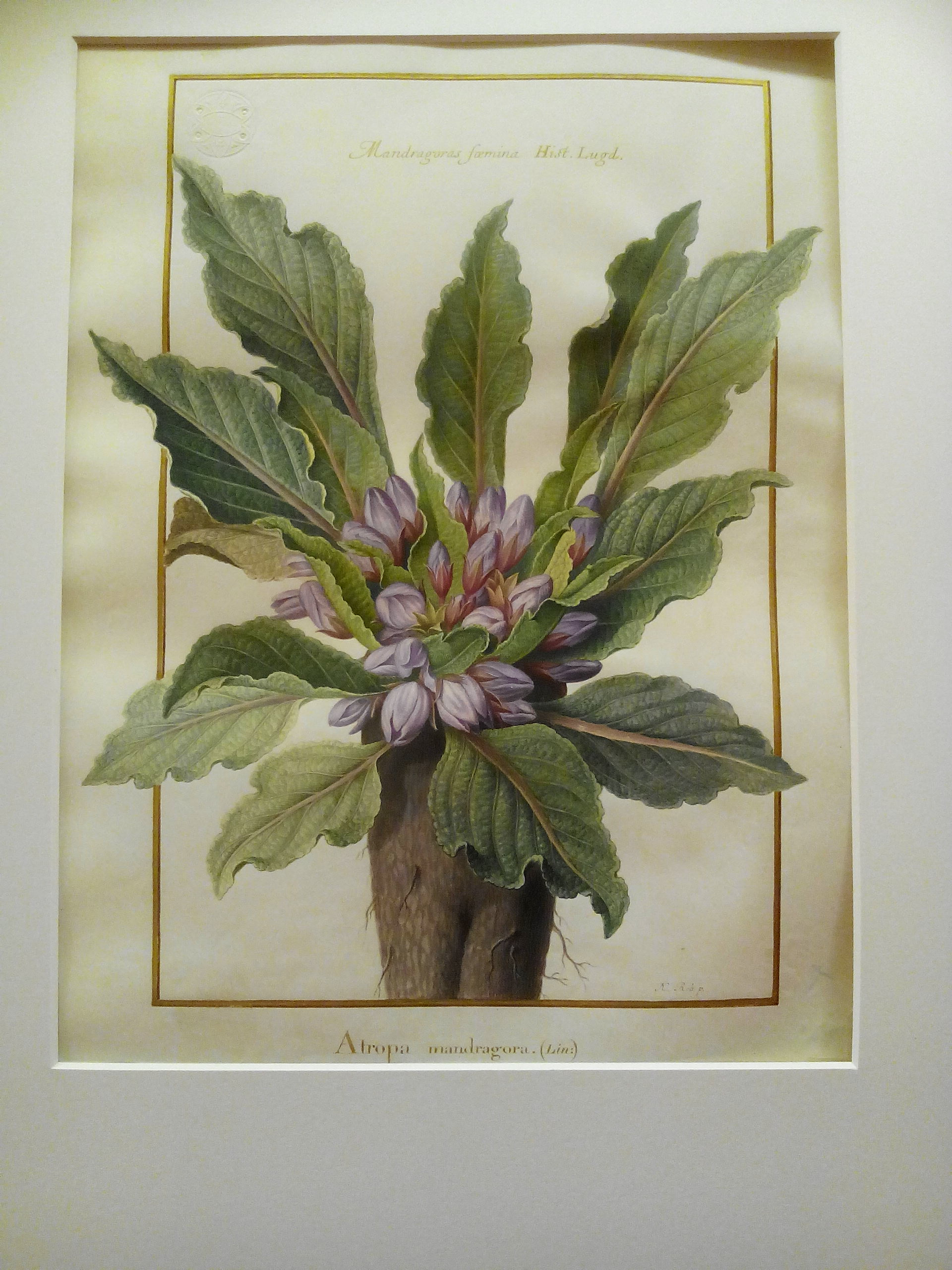 Mandragora officinarum, Linné (Solanacées) Nicolas Robert (1614-1685) "Mandragoras faemina, Hist lugd" "Atroa madragora, Linné," "France méridionale" Vélin, portefeuille 23, folio 26